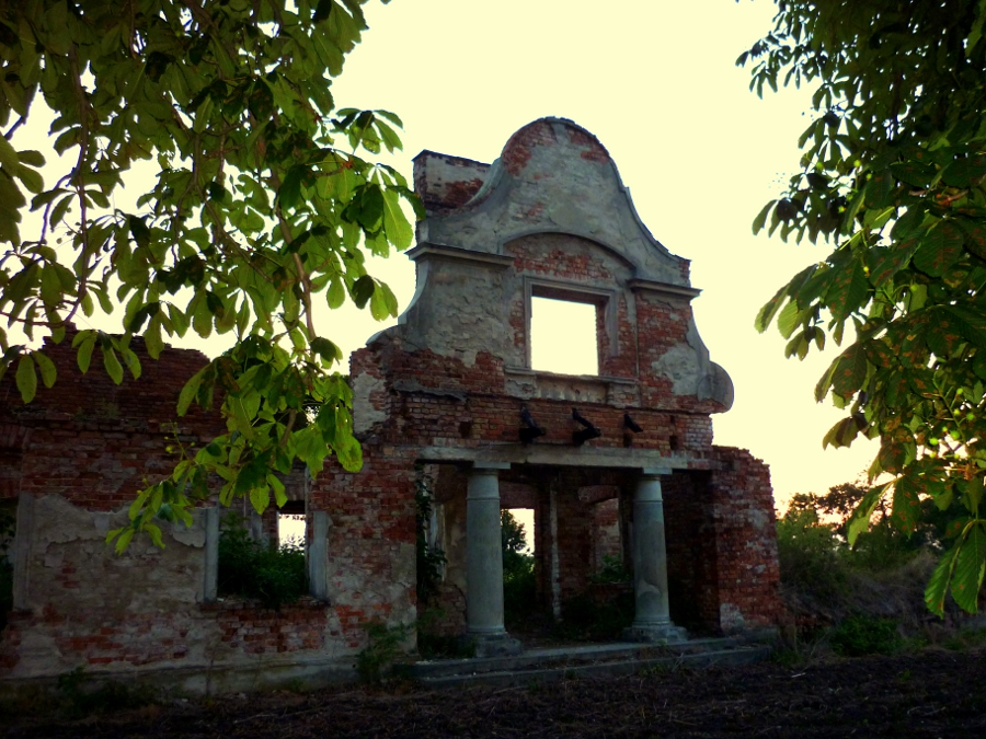 Ruiny dworu w Klukowie od strony frontowej.